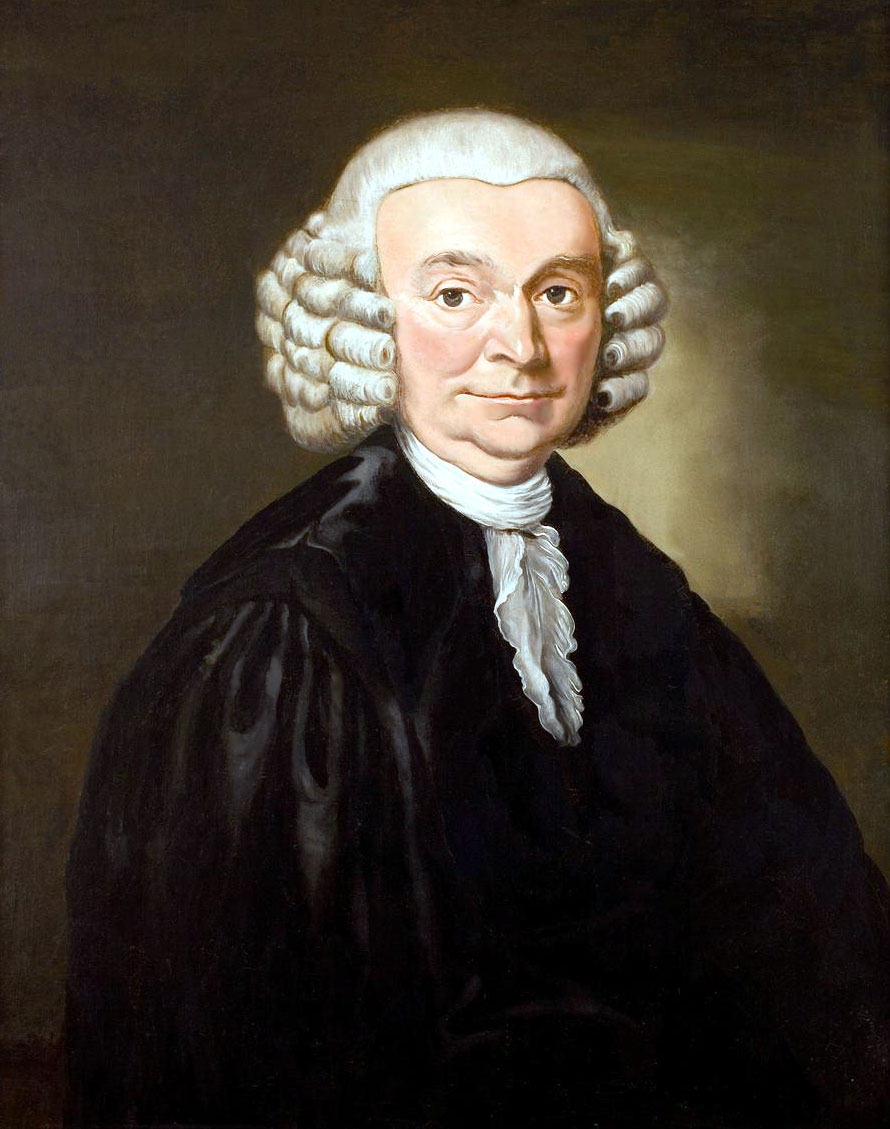 Leids hooglerarenportret van Adriaan Kluit, Bijzondere Collecties Universiteit Leiden. Icones Leidenses 180